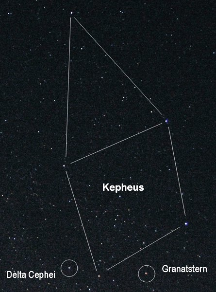 Sternbild Kepheus, fotografiert 15 Sekunden, Blende 2,0, Canon G5